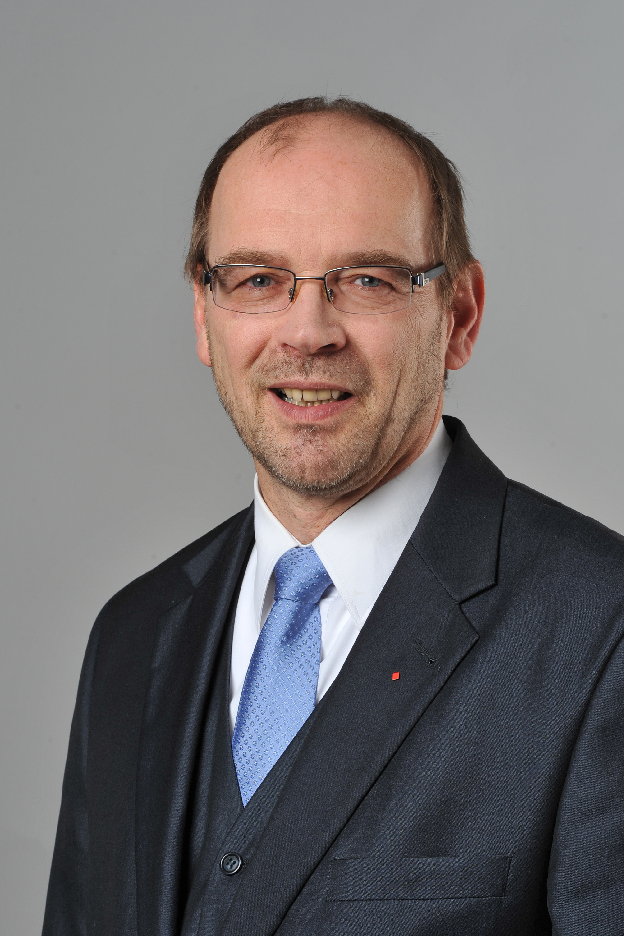 Landtagsprojekt Nordrhein-Westfalen 27. - 29. November 2013 Rainer Schmeltzer